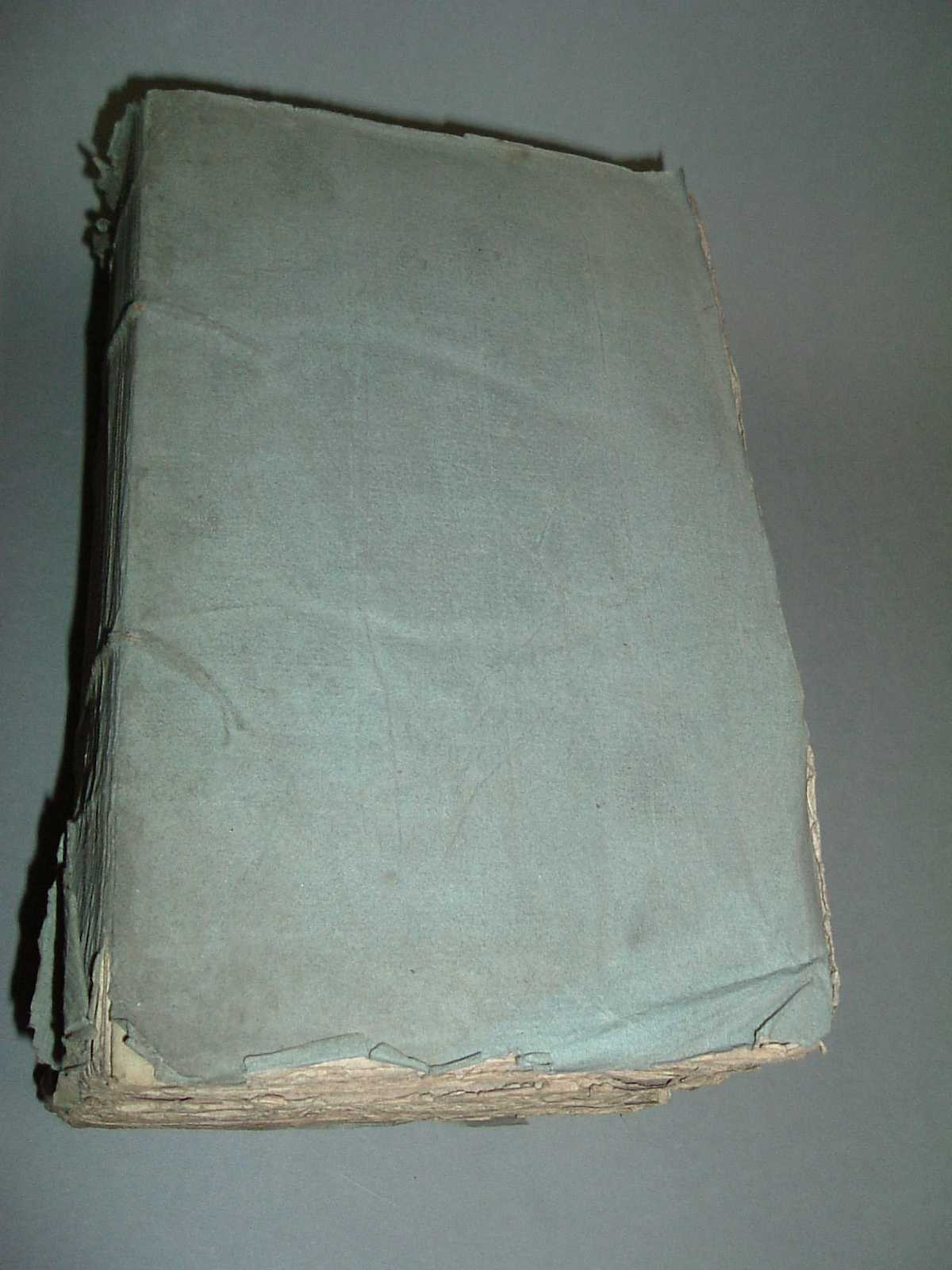 Beispiel eines einfachen Interimseinbandes, hier ein Code Napoleon von 1810.